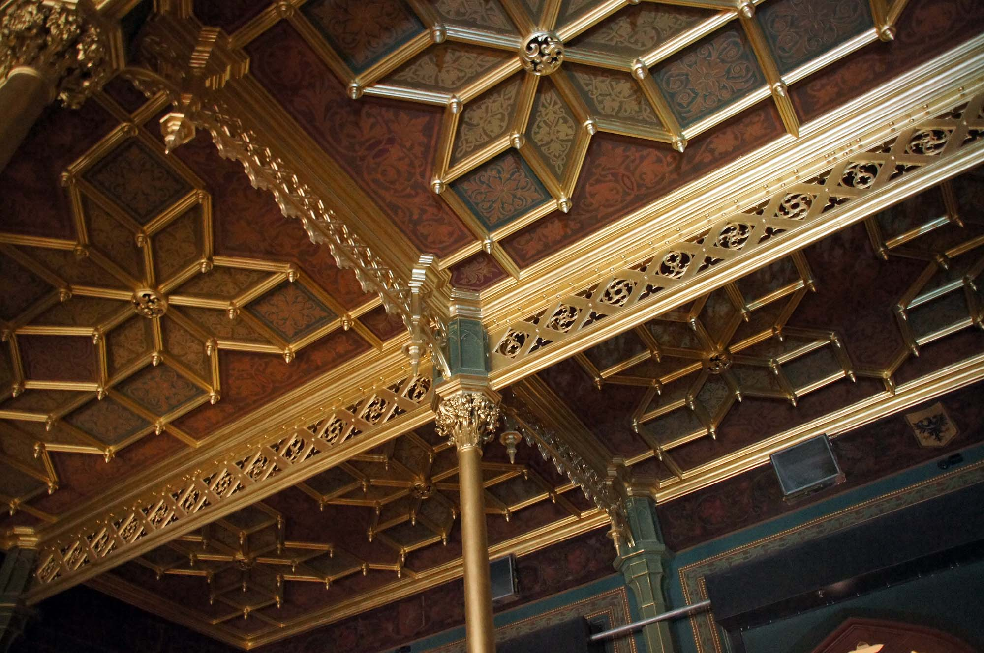 Wrocław, zespół Dworca Głównego